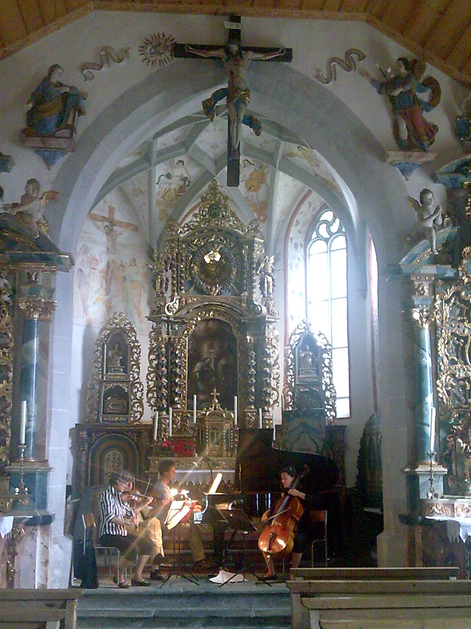 Ars Amata probt für ein Konzert in St.Remigius